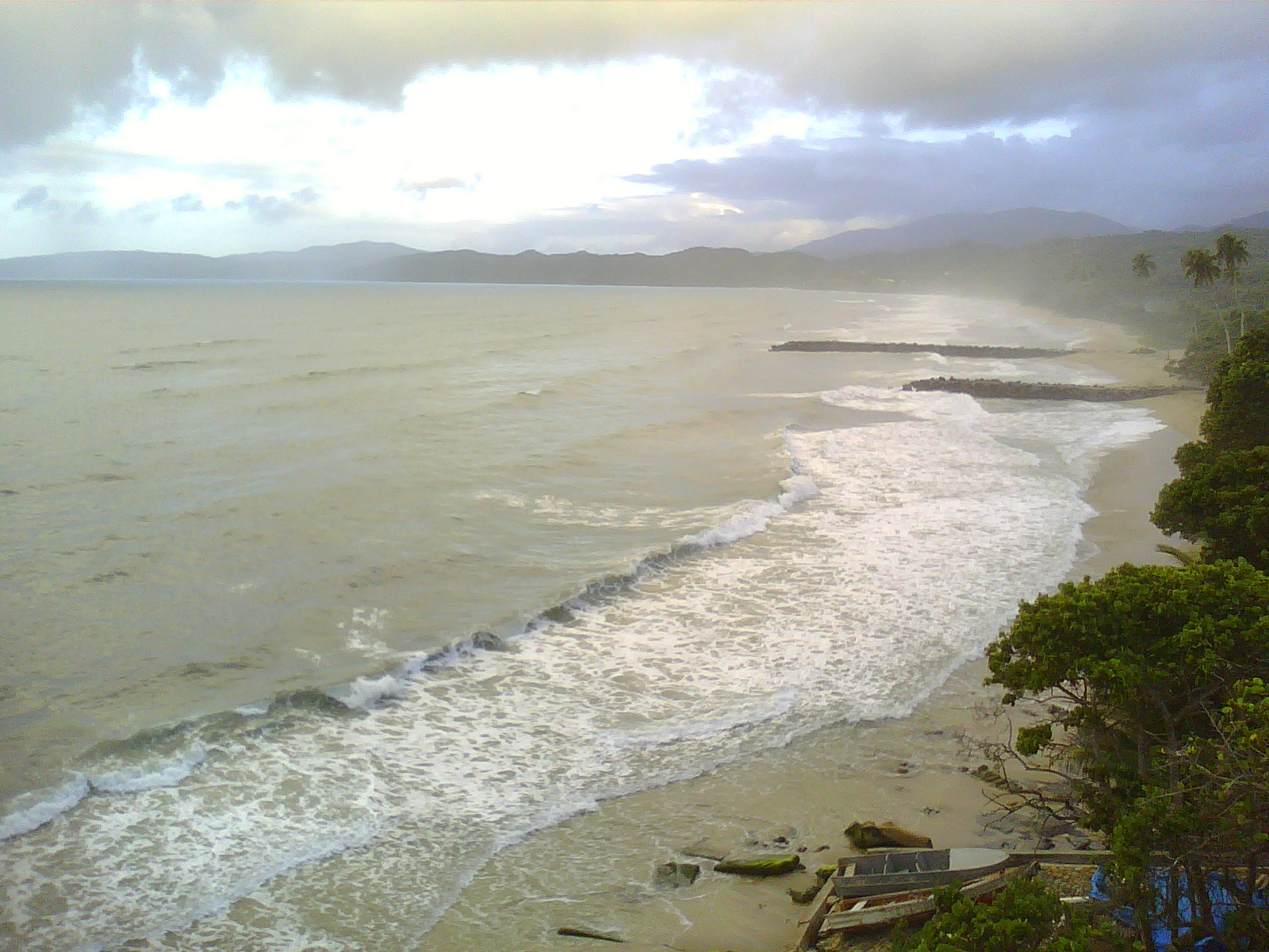 Vista desde el mirador de la Playa de La Sabana, población de la parroquia Caruao del Estado Vargas, Venezuela.